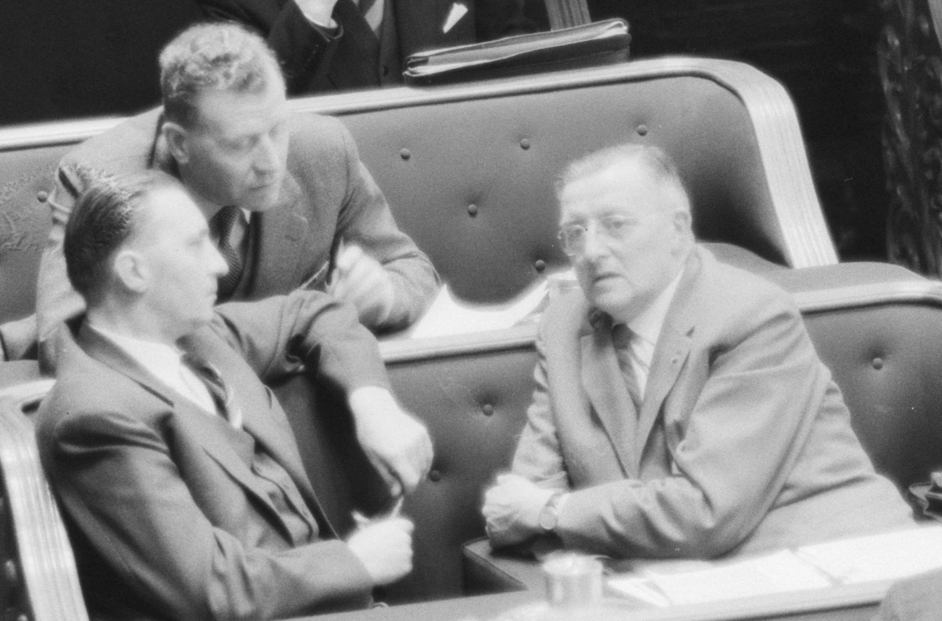 Collectie / Archief : Fotocollectie Anefo Reportage / Serie : [ onbekend ] Beschrijving : Financiele beschouwingen in de Eerste Kamer, dr. Berghuis en J. C. Haspels (rechts vooraan) in gesprek met P. C. Elfferich (achter) Datum : 27 december 1960 Trefwoorden : BESCHOUWINGEN, Eerste Kamer, gesprekken Persoonsnaam : J. C. Haspels, P. C. Elfferich, dr. Berghuis Fotograaf : Bilsen, Joop van / Anefo Auteursrechthebbende : Nationaal Archief Materiaalsoort : Negatief (zwart/wit) Nummer archiefinventaris : bekijk toegang 2.24.01.04 Bestanddeelnummer : 911-9149